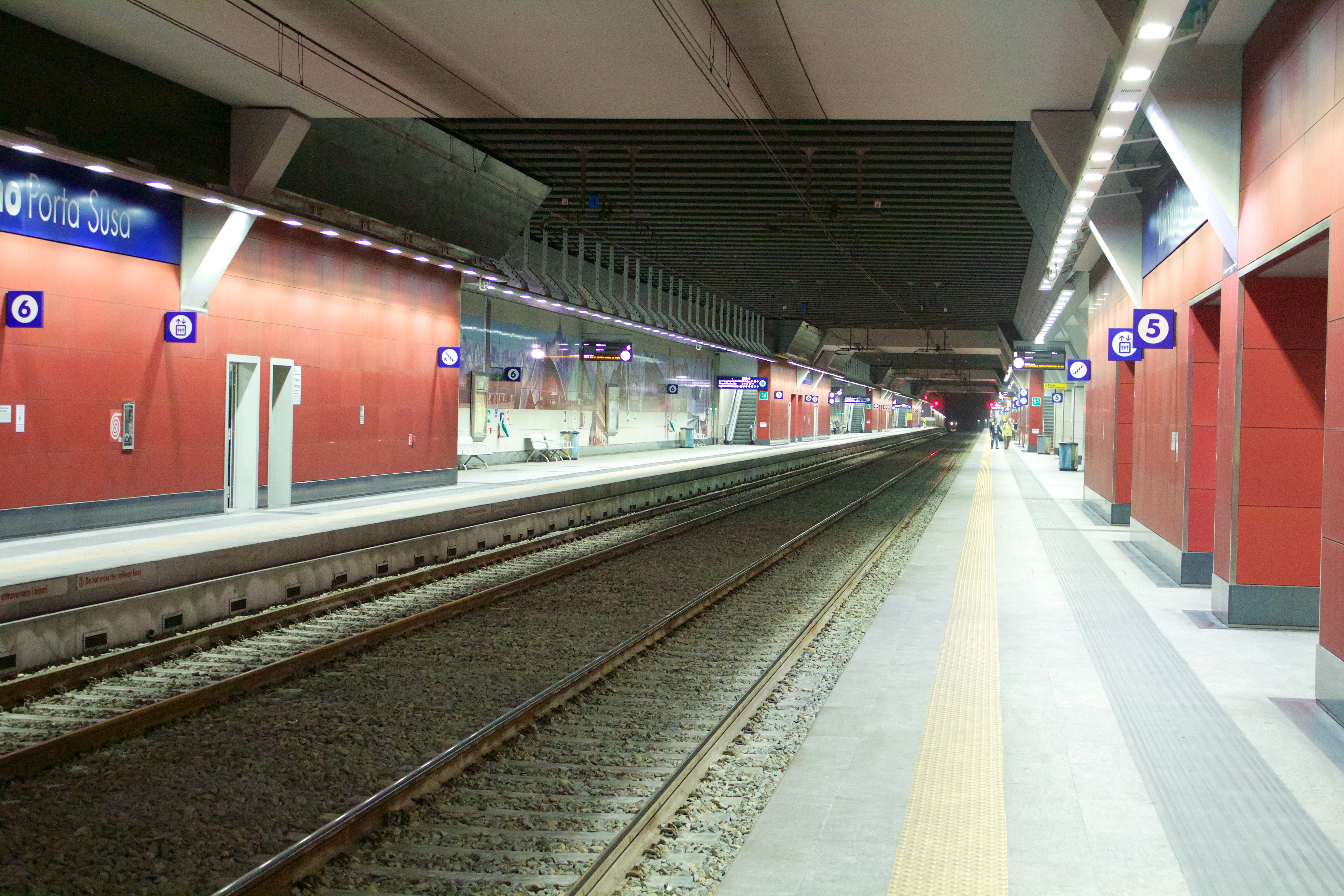 Piazzale binari della stazione di Torino Porta Susa